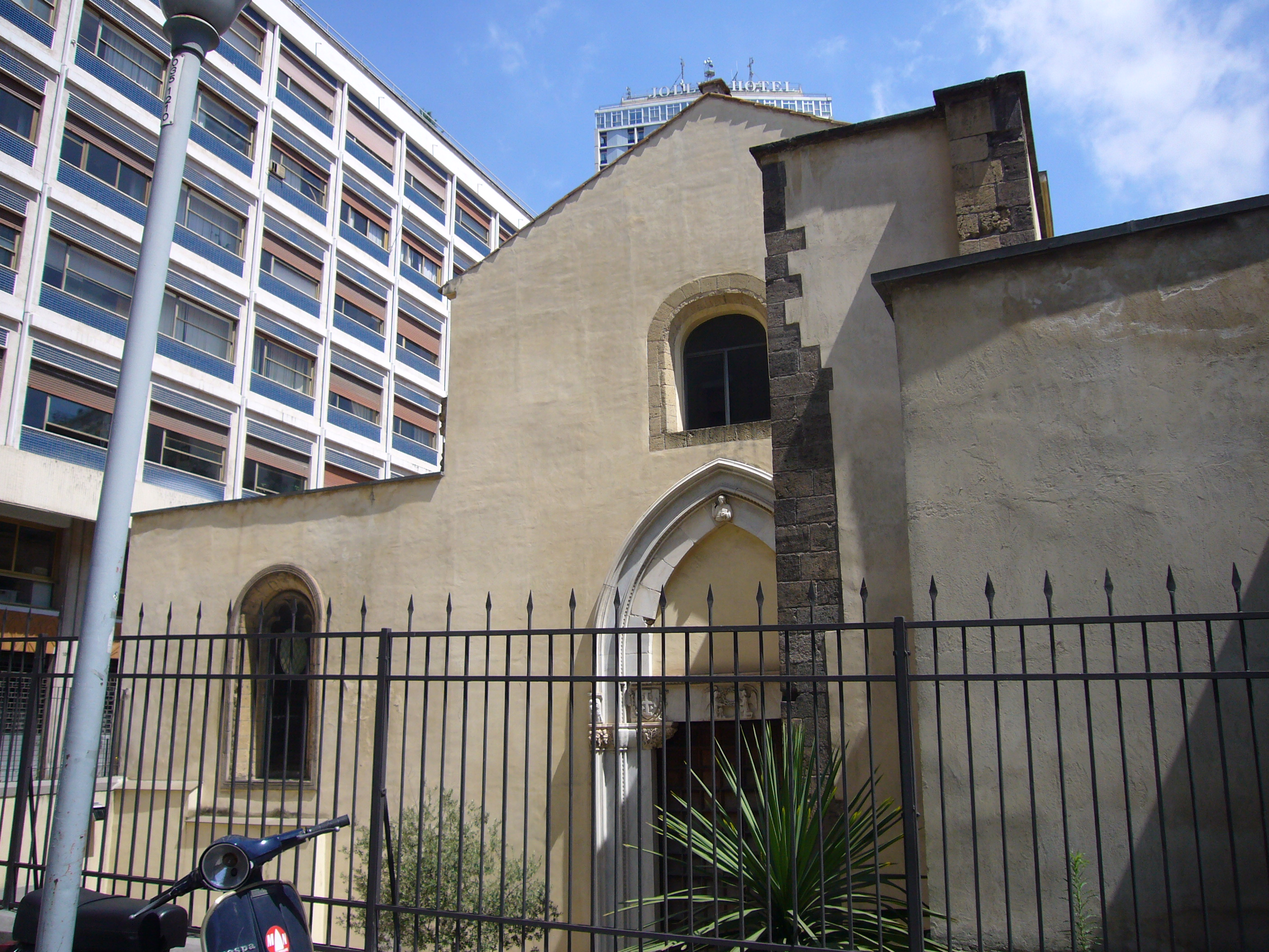 Napoli, Santa Maria dell'Incoronata, facciata antica